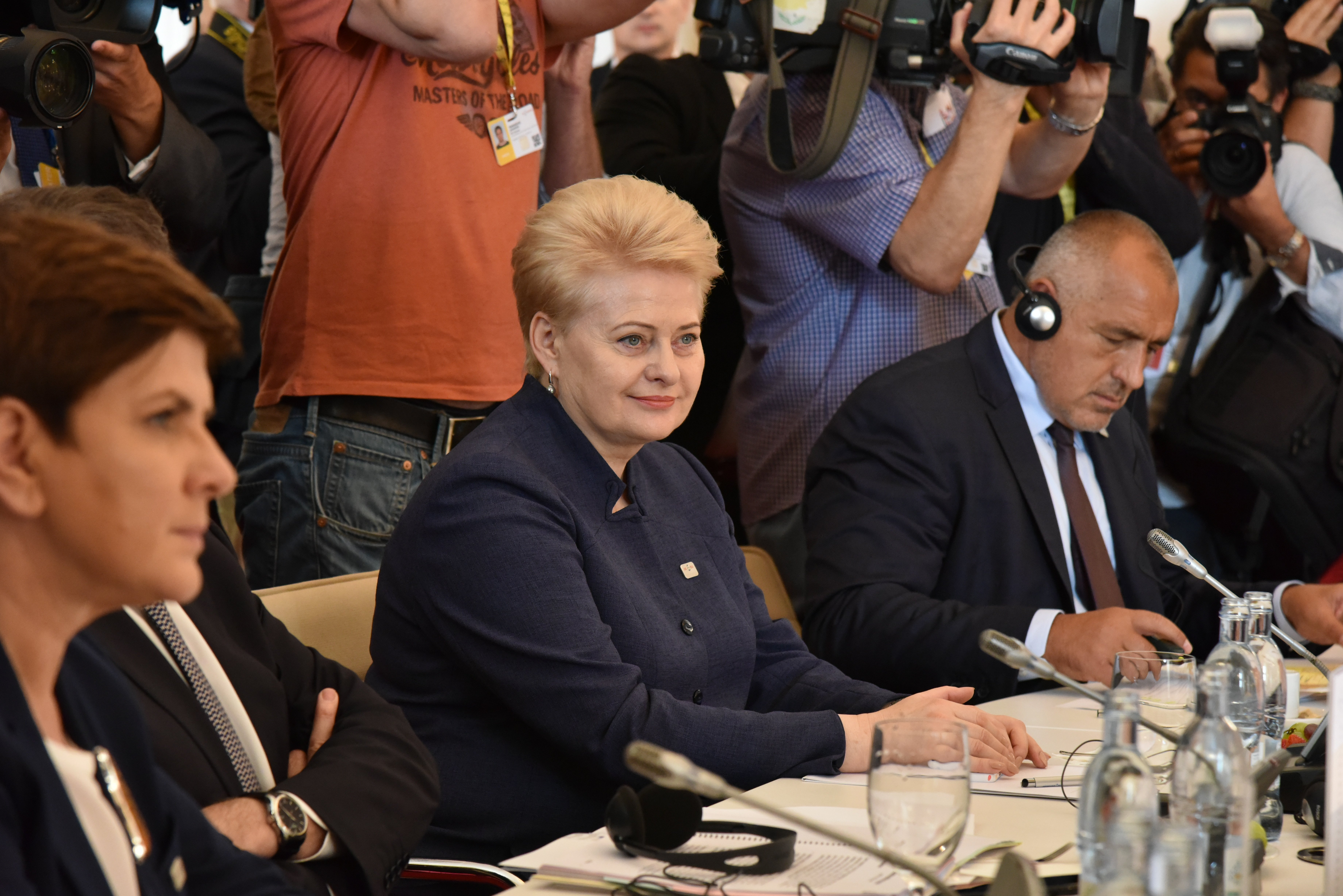 BRATISLAVA SUMMIT 16 SEPTEMBER 2016 ph halime sarrag